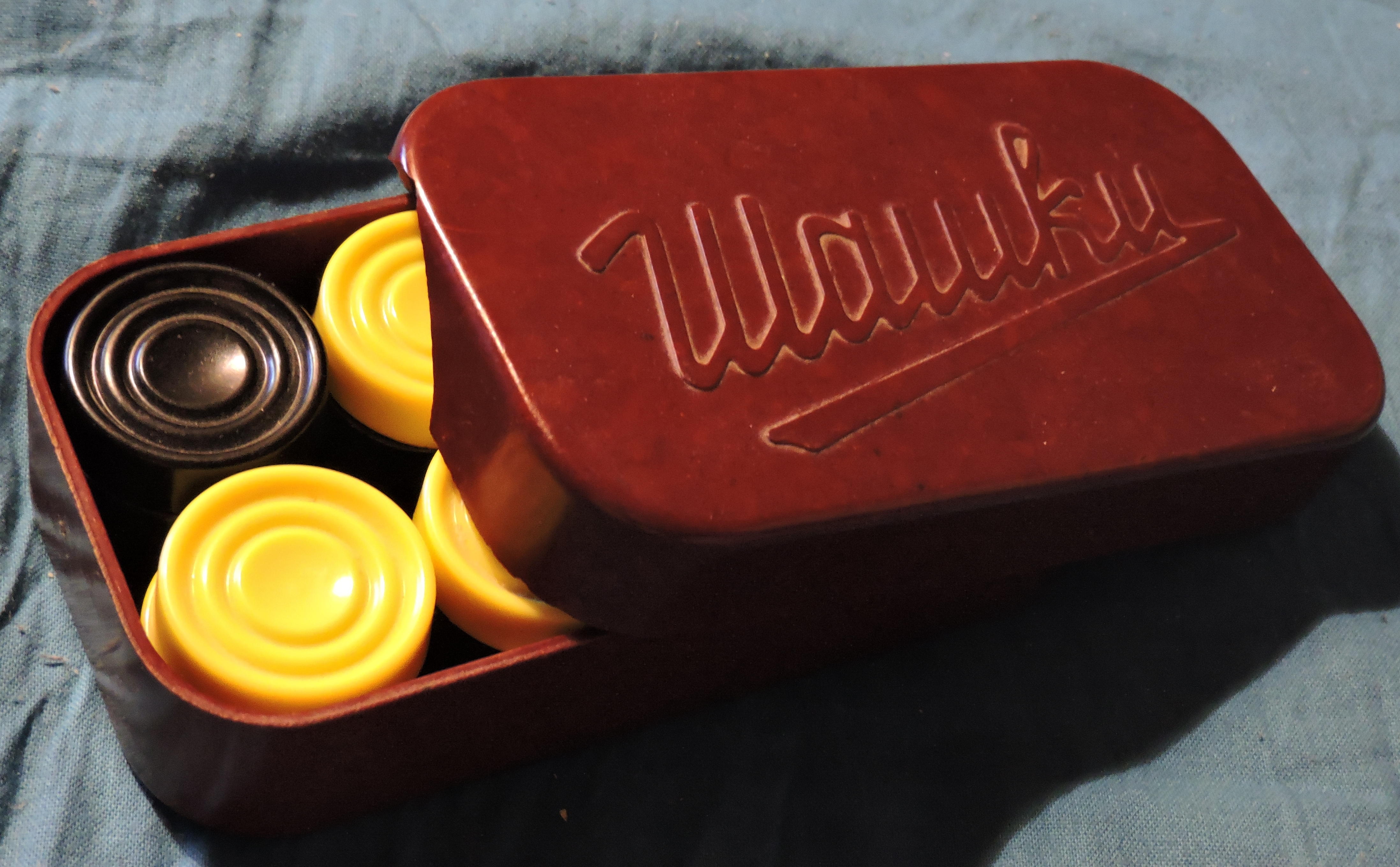 Набор для игры в шашки-64